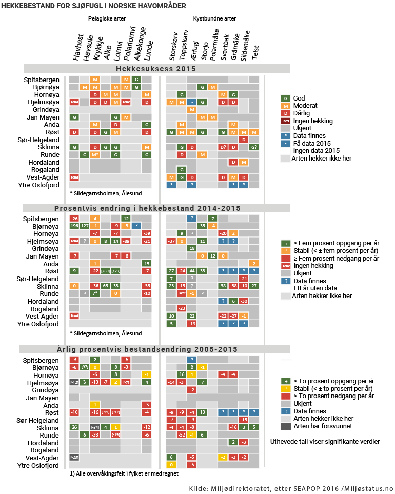 Grafikken viser hekkesuksess, prosentvis endring i hekkebestand og årlig prosentvis bestandsendring 2005-2015